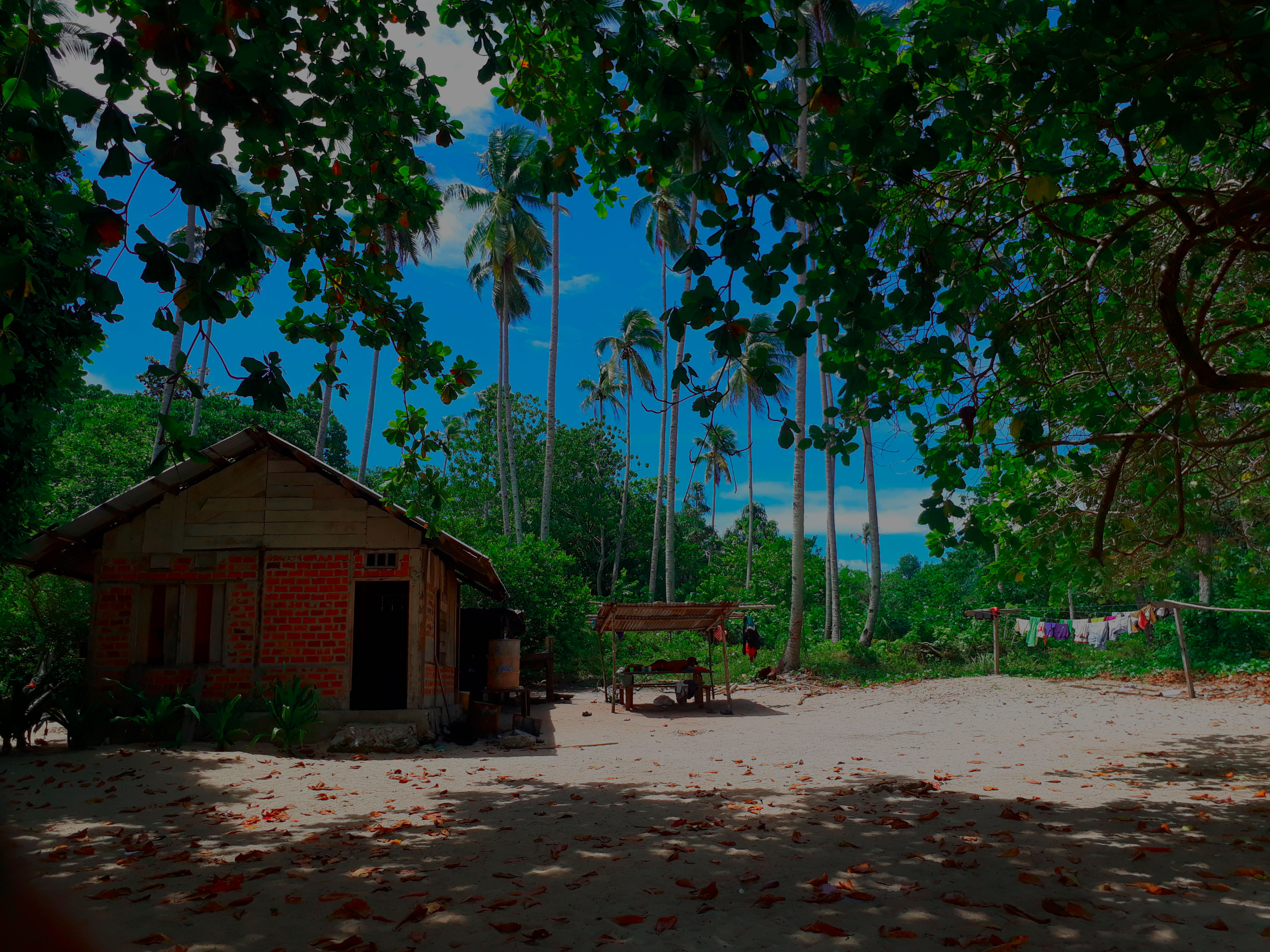 salah satu tempat tinggal yang terdapat Pulau Amsterdam, Tambrauw